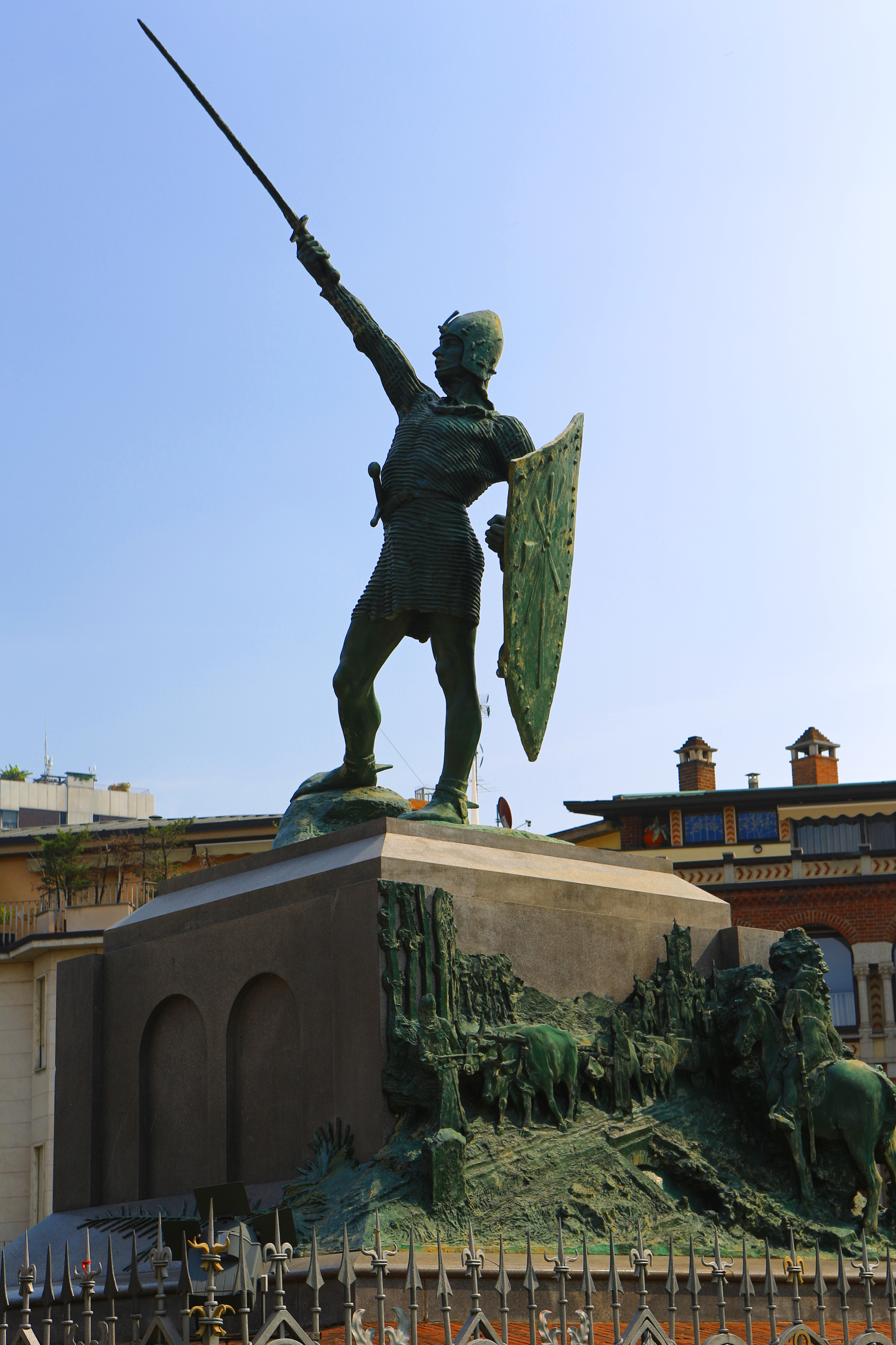 Monumento "Alberto da Giussano" This is a photo of a monument which is part of cultural heritage of Italy.